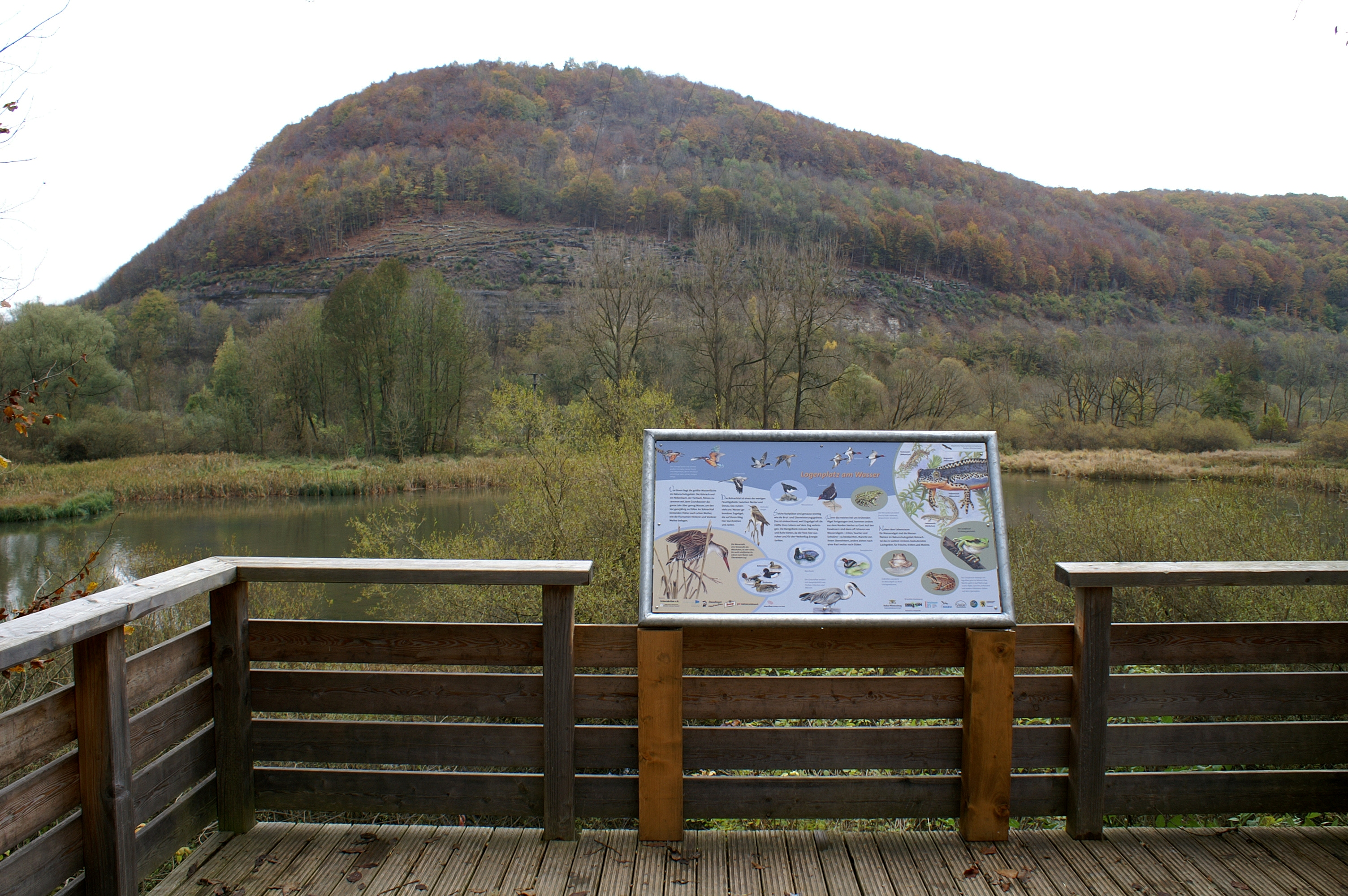 Naturlehrpfad im Naturschutzgebiet Rohrachtal bei Geislingen an der Steige